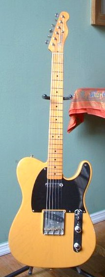 Fender Telecaster. Quelle